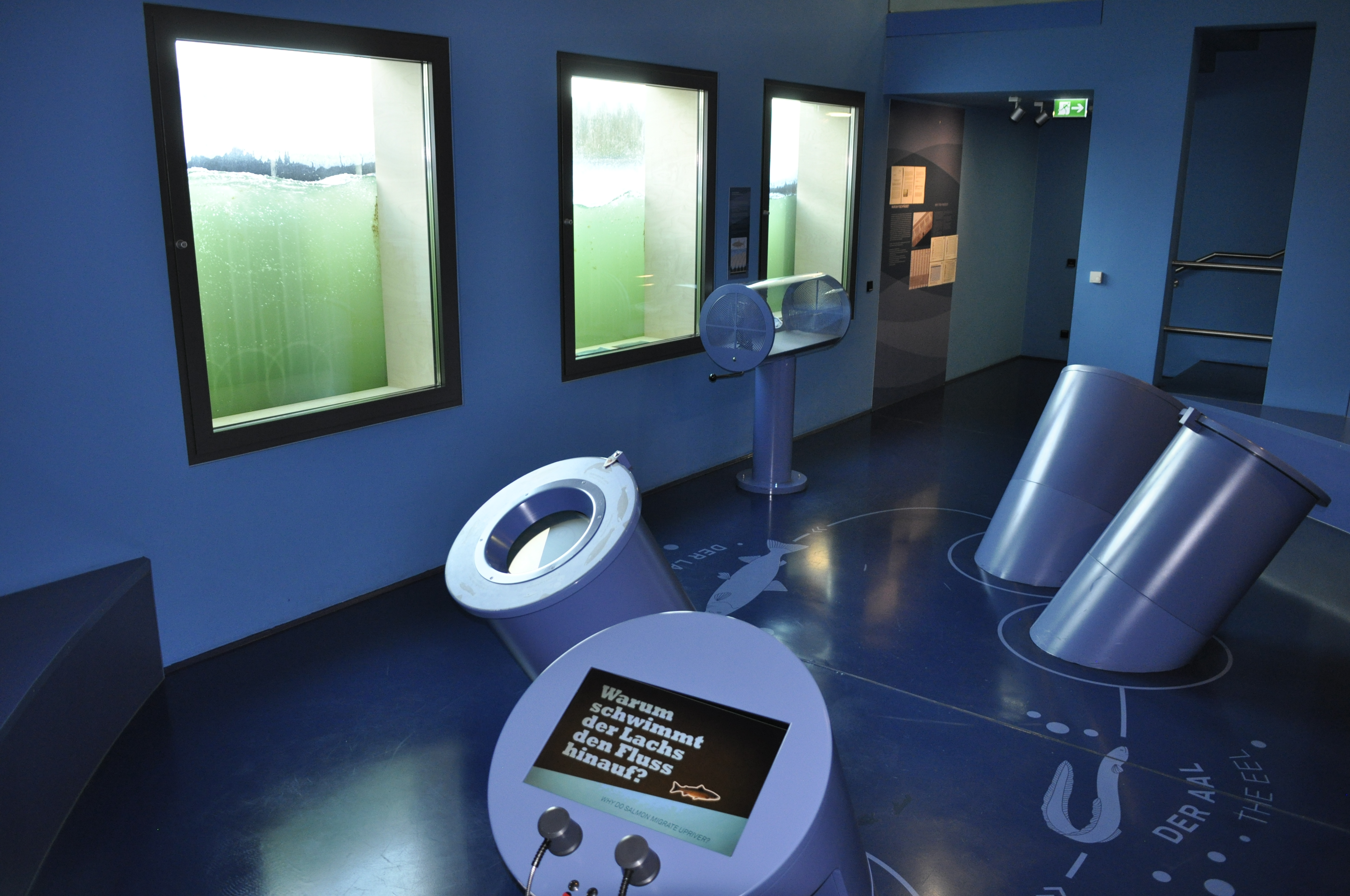 Die Unterwasserebene mit Ausblick auf den Fischpass